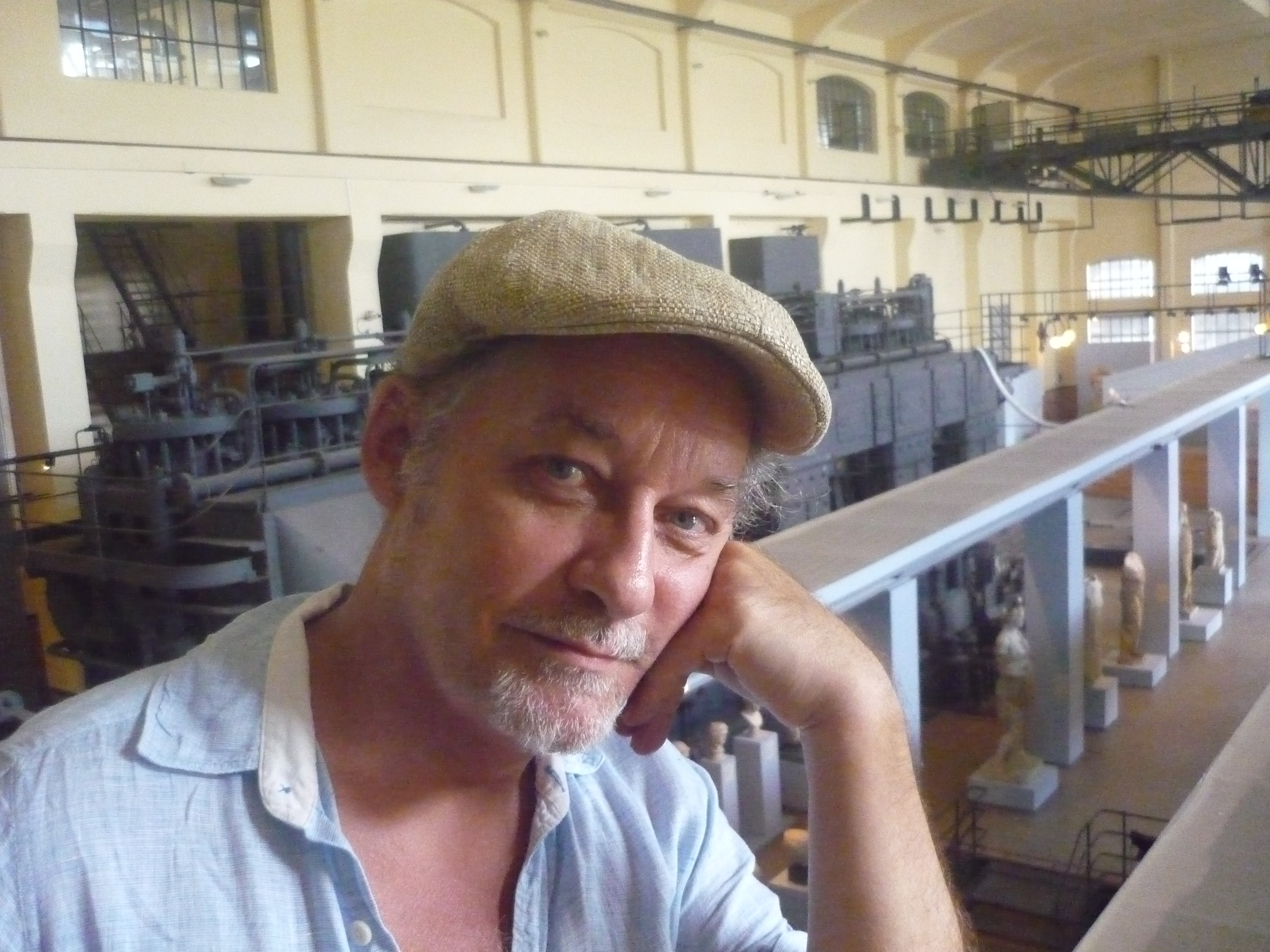 photo prise à Rome